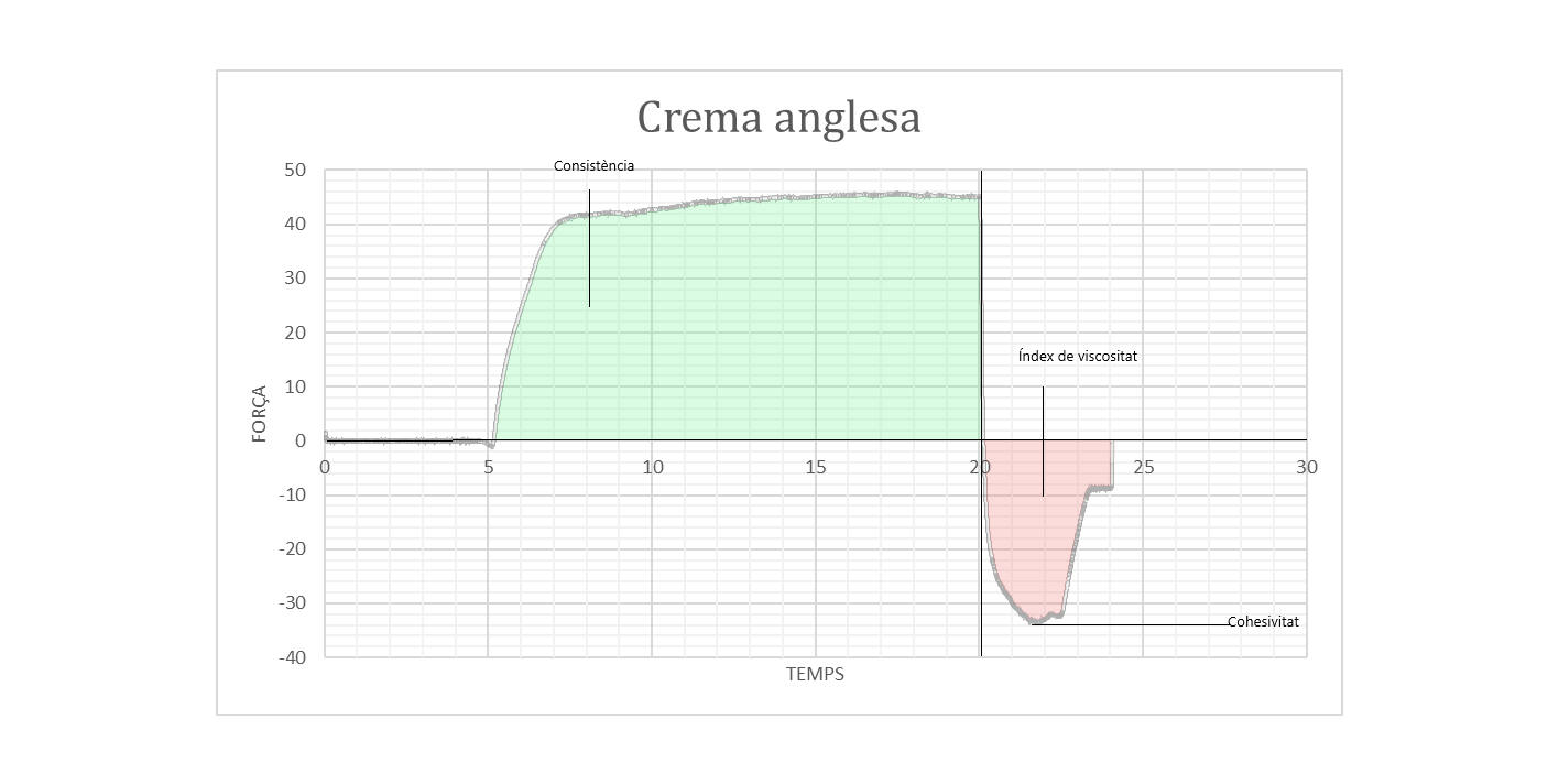 A continuació, calcularem els paràmetres físics de la crema anglesa a partir de les F1 = Fermesa = 45,759 g A1 = Consistència = 620,877 g/s Pic negatiu = Cohesivitat = -33,58g À1w = Índex de viscositat = -91,551